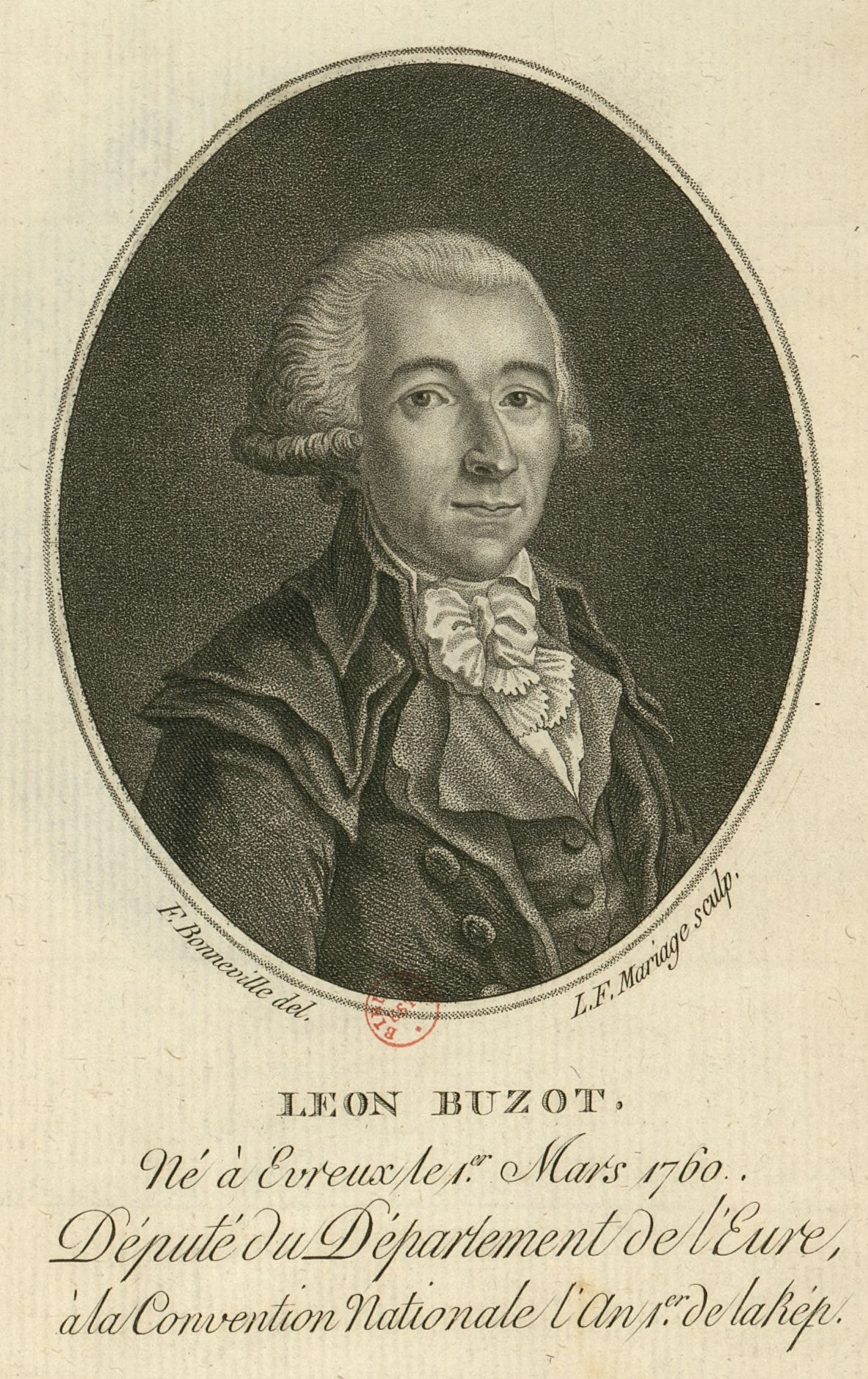 Buzot, député du département de l'Eure à la Convention nationale (estampe)